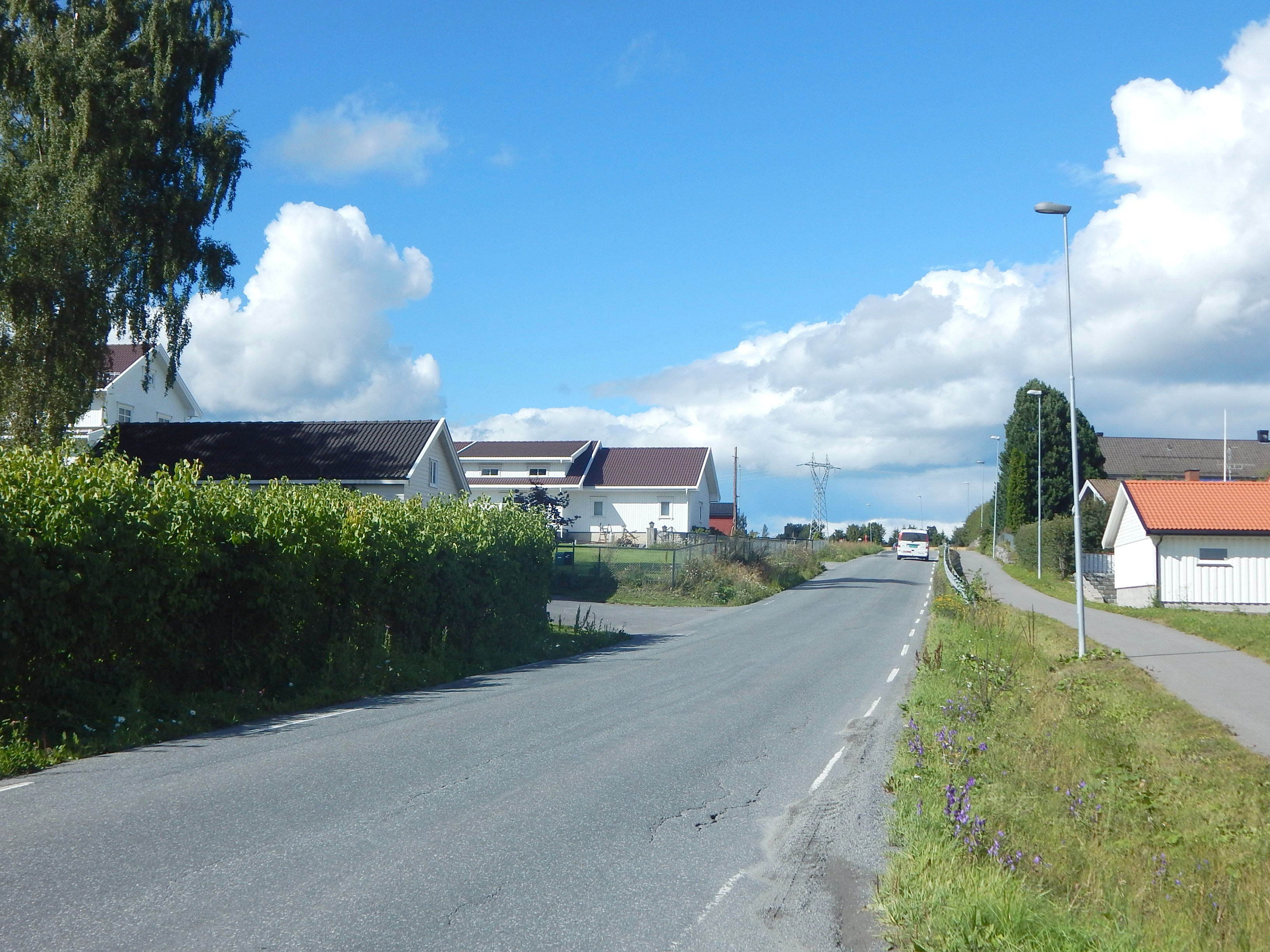 Slettavegen (fylkesvei 2356, tidl. 86)